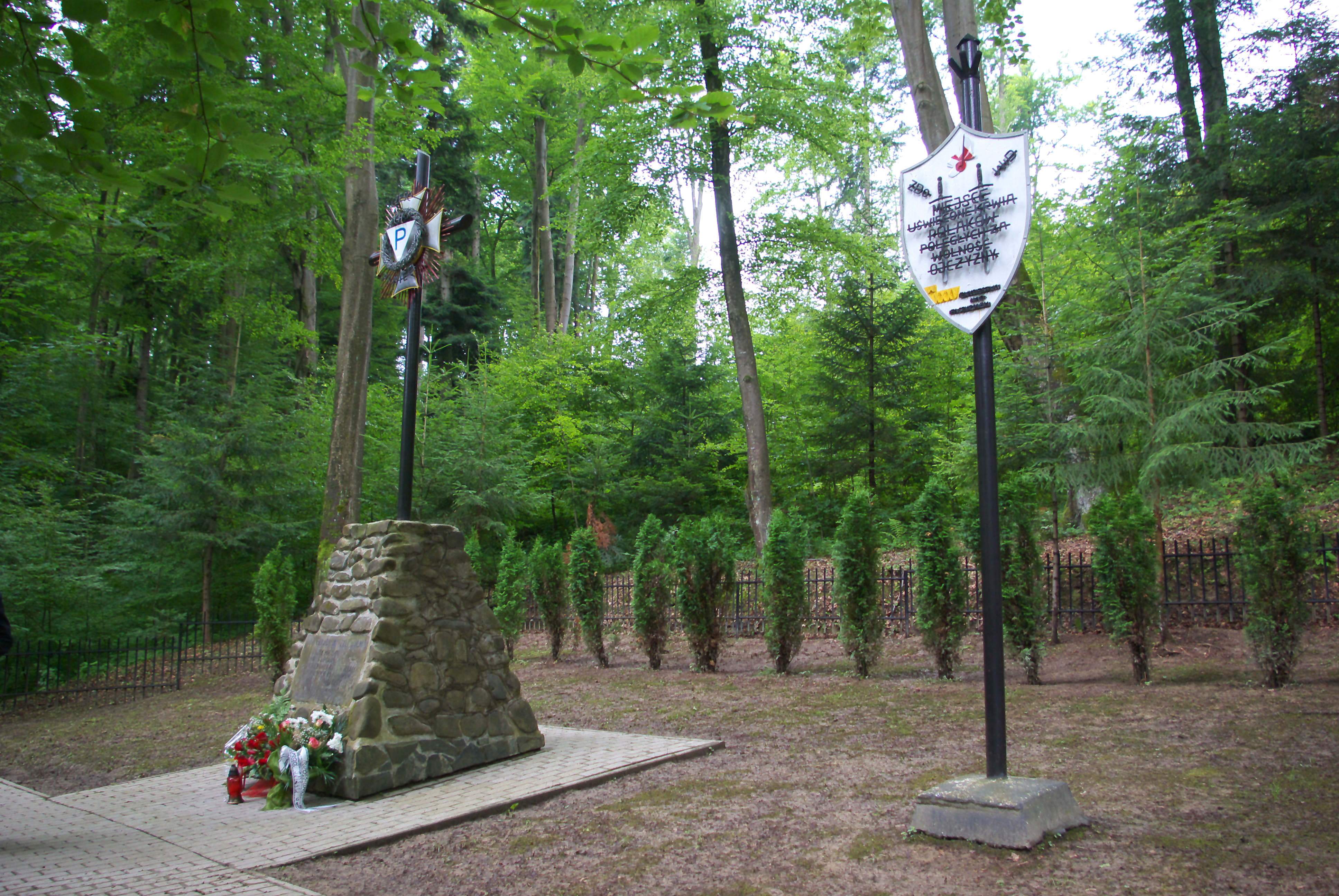 Uroczystości 77. rocznicy egzekucji na górze Gruszka z 1940 roku (7 czerwca 2017).